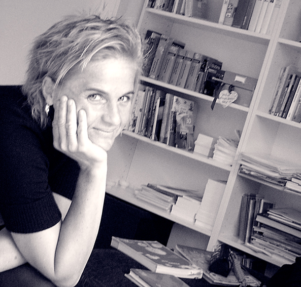 Portrait der Autorin nach einer Lesung im Juli 2009